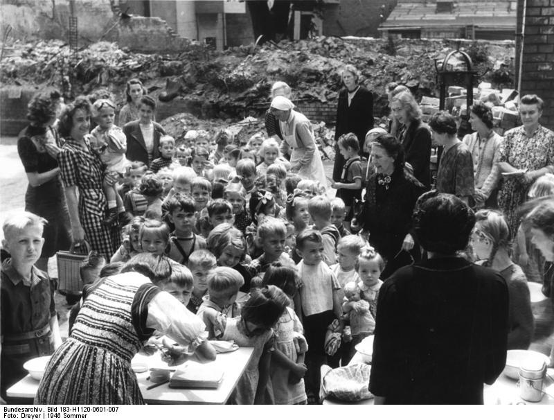 Berlin-Tempelhof, Kinderspeisung Zentralbild/H.Dreyer Kinder in Berlin-Tempelhof (Westsektor) erhielten im Sommer 1946 zusätzliche Speisen, die von Schweden geliefert wurde [Schwedenspeisung]. Die Ausgabe erfolgte im "Tuskulum", Dorfstraße Ecke Berliner Straße